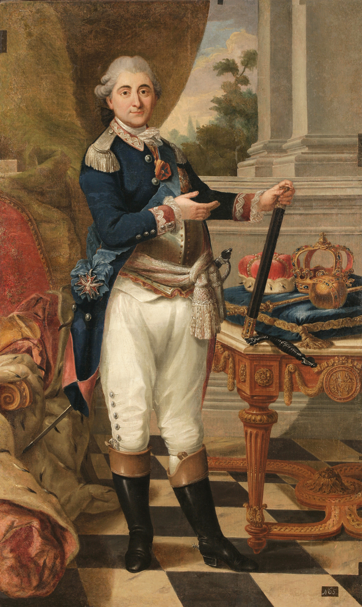 Палатно, алей